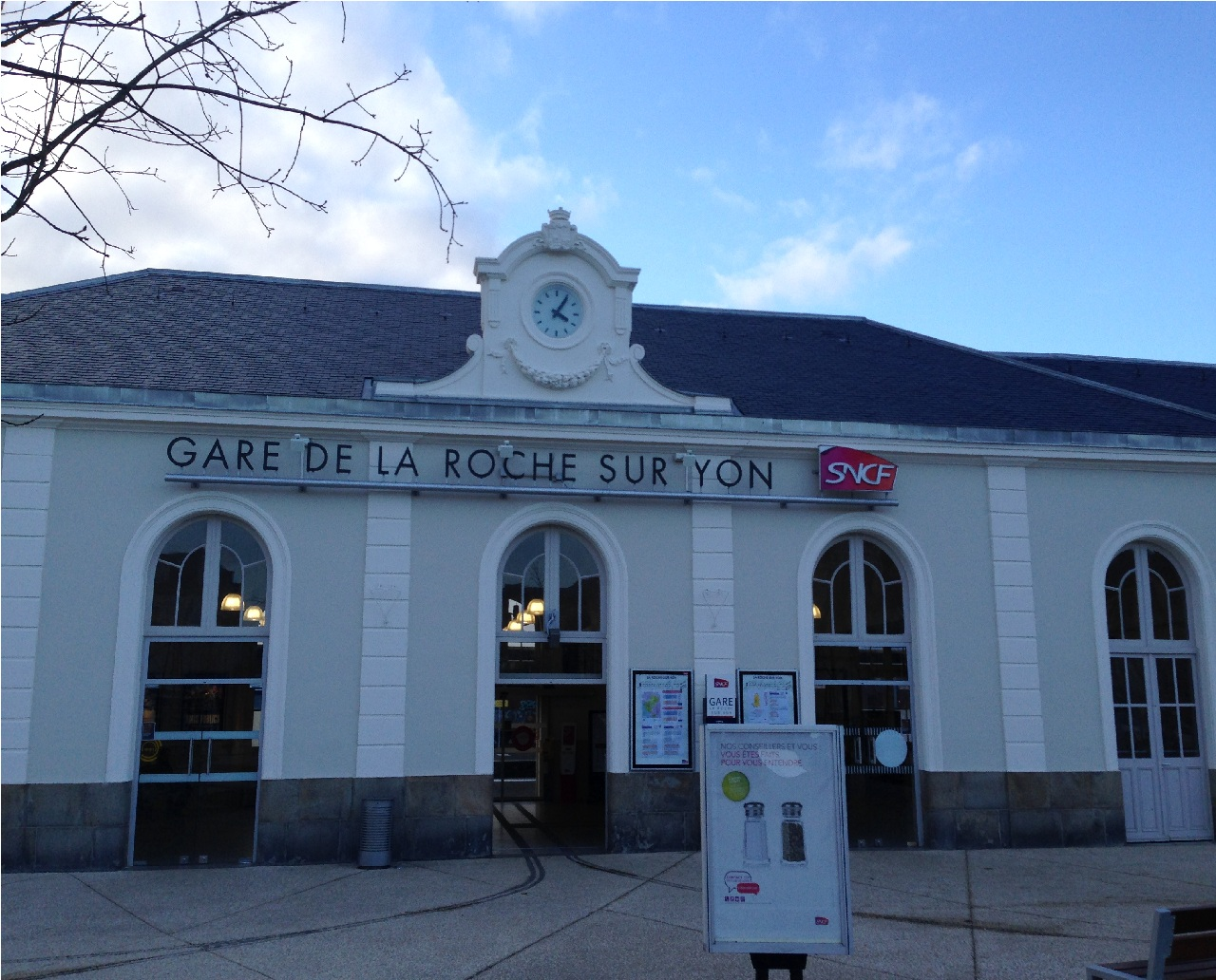 Gare de La Roche-sur-Yon-2015